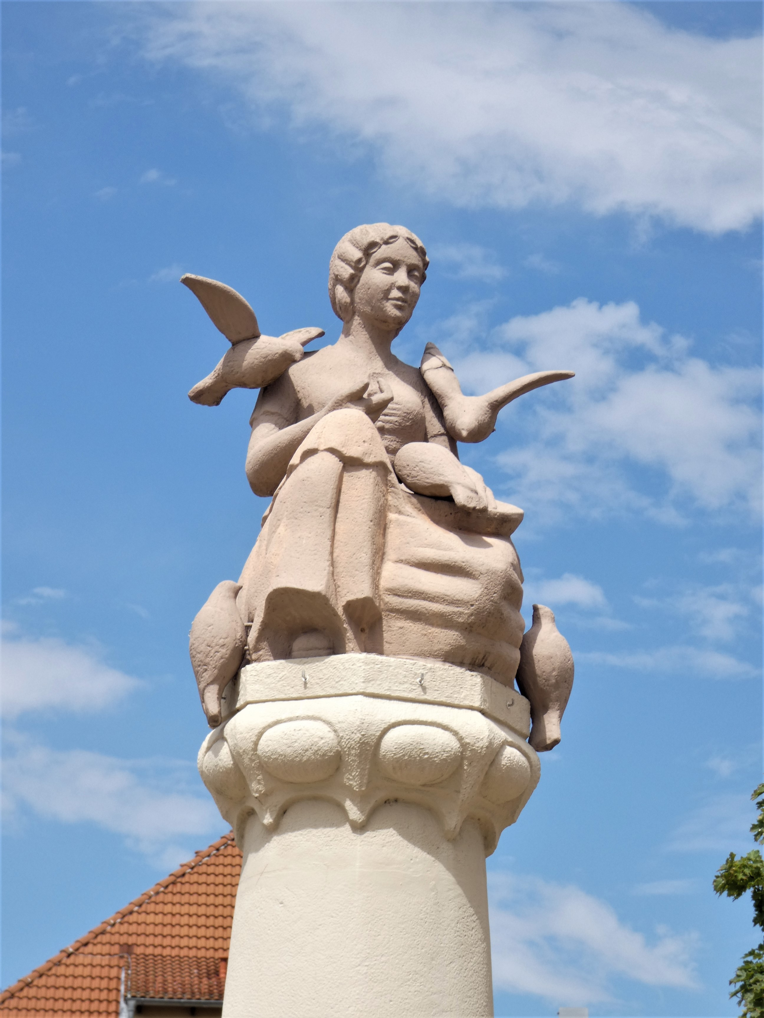 Aschenputtel-Figur des Märchenbrunnens in Weißenfels